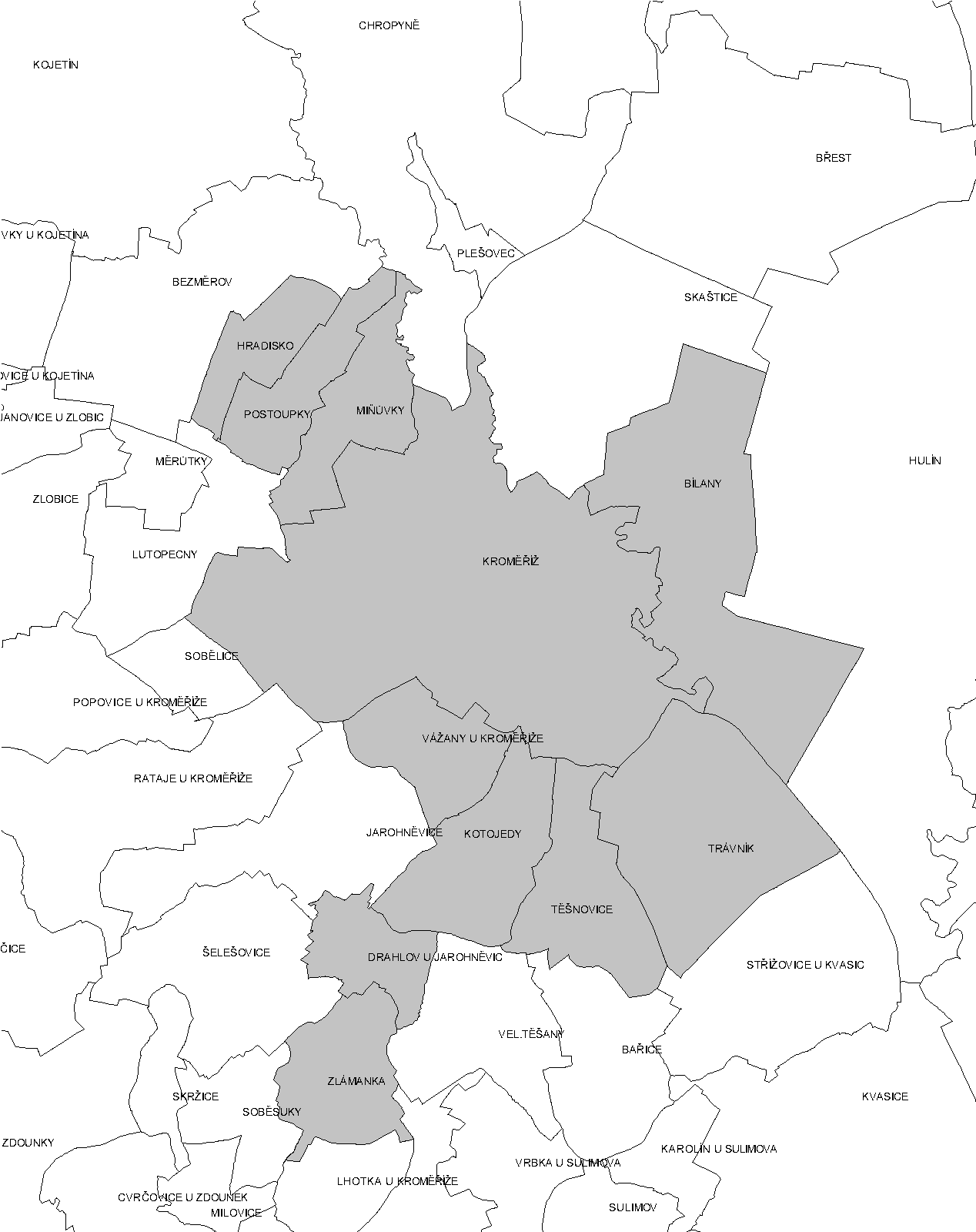 Katastrální území Krměříže